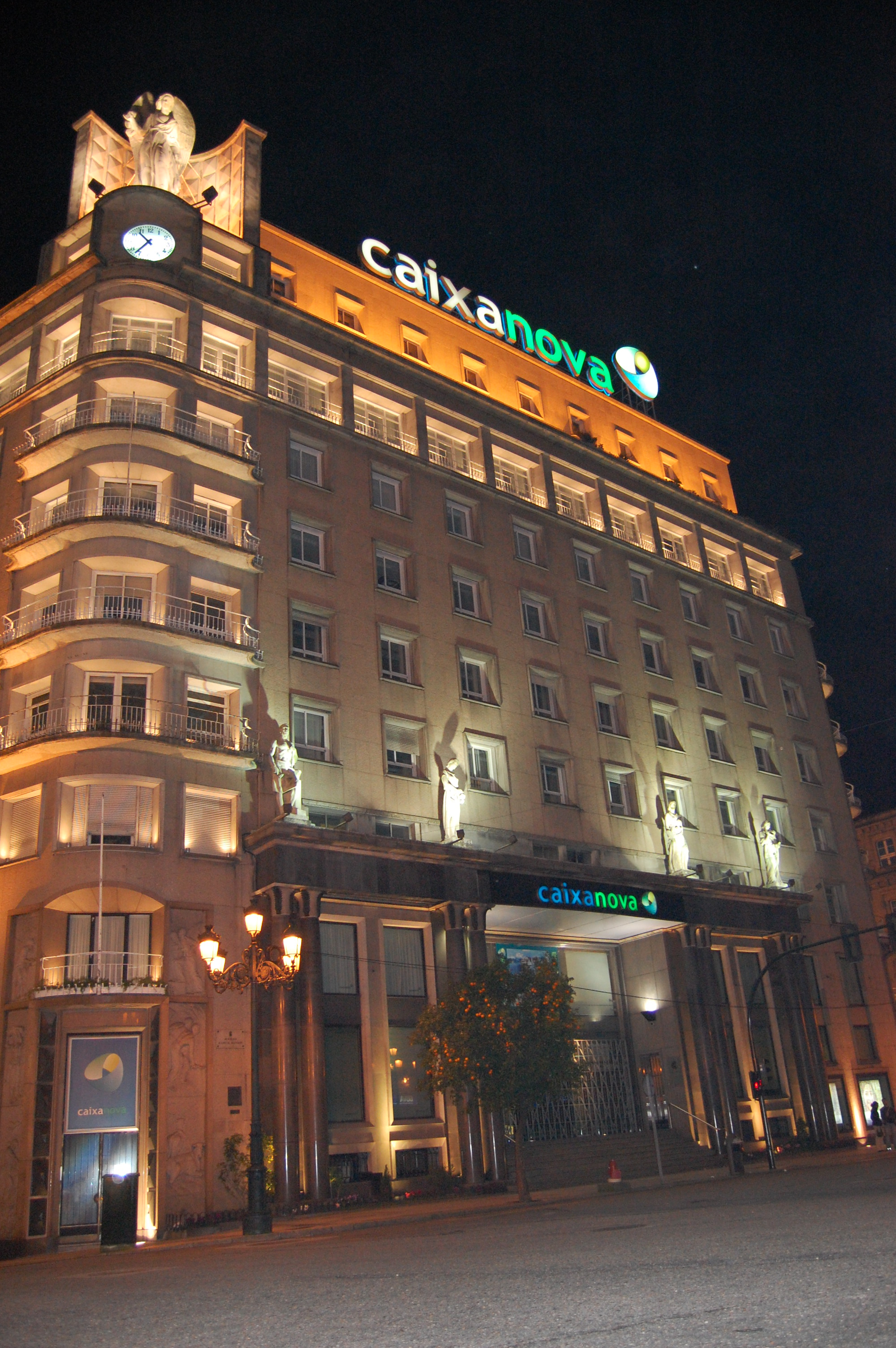 Sede do banco Caixanova de Vigo.